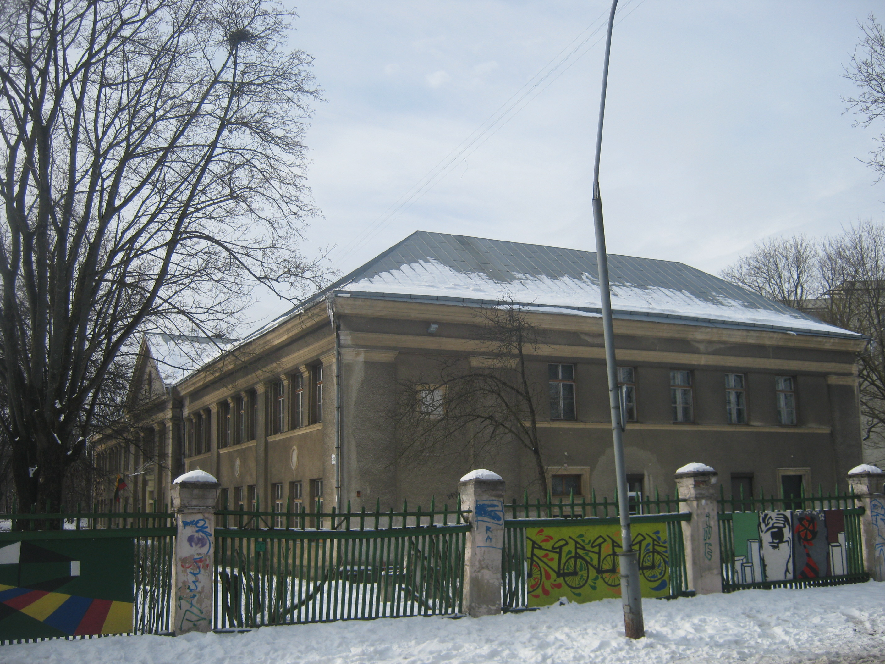 Vilniaus Justino Vienožinskio dailės mokykla